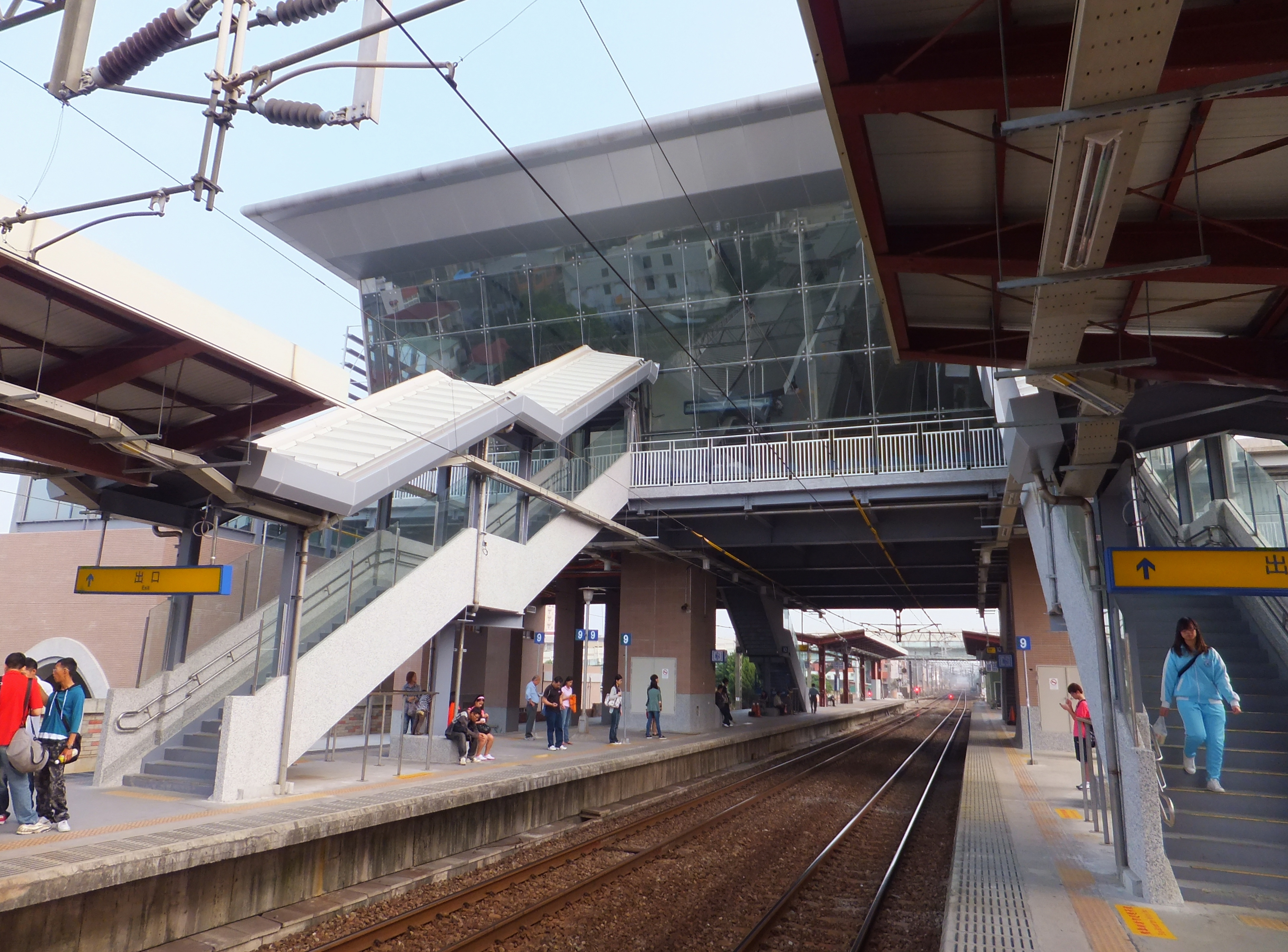 由第二月臺南端北望臺鐵湖口站站房與軌道。